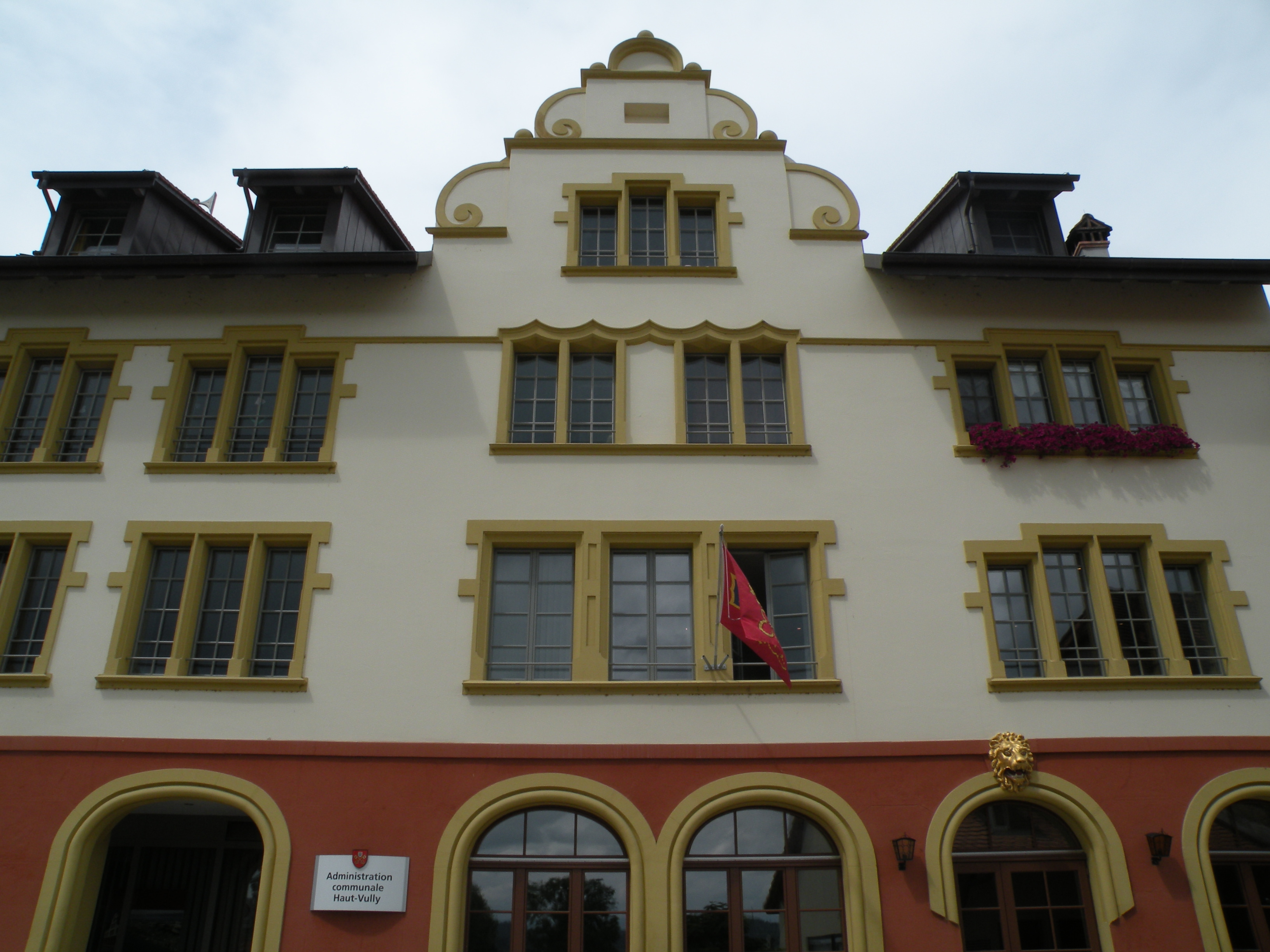 Maison communale de Haut-Vully